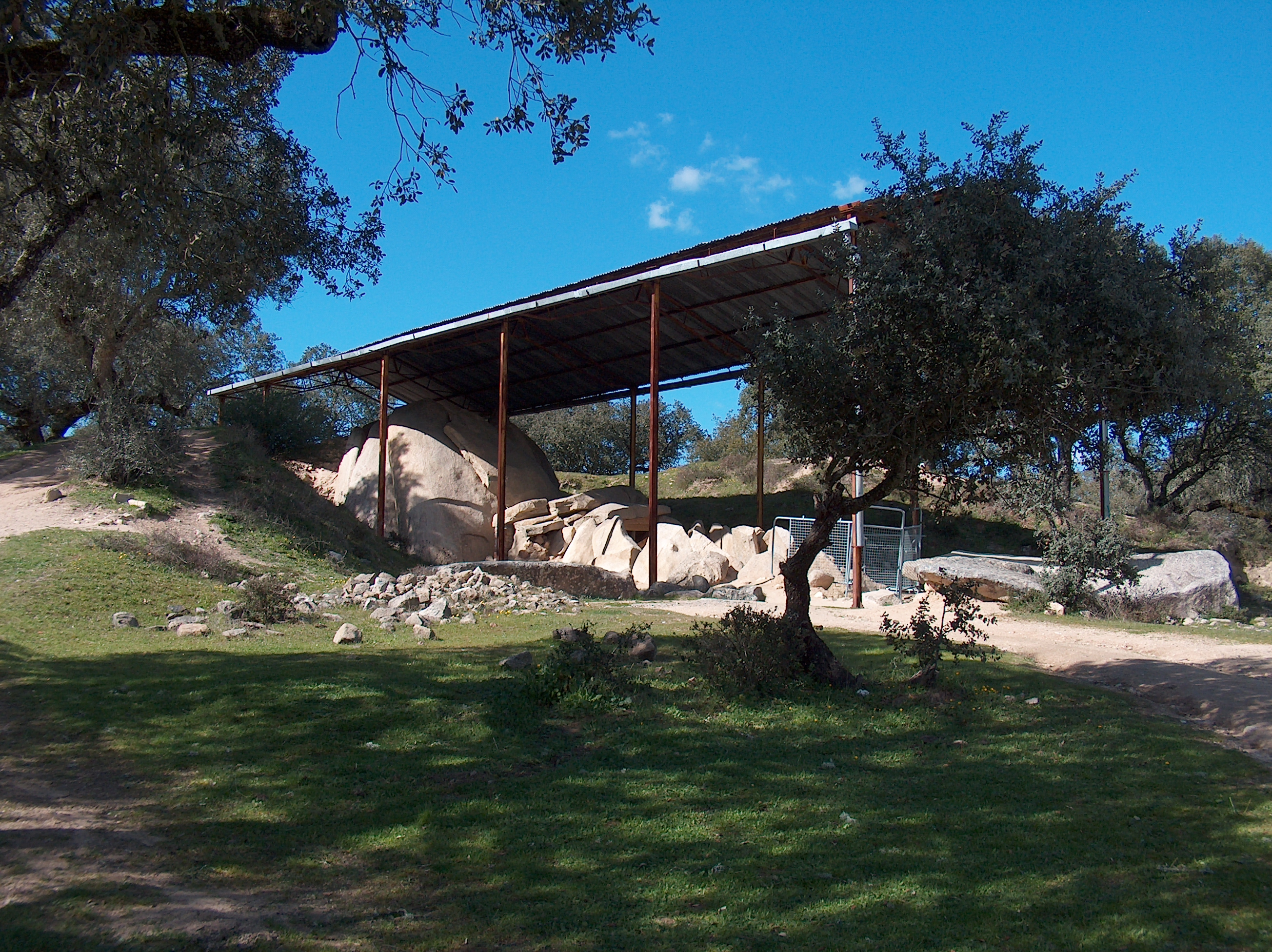 Anta Grande do Zambujeiro ou Anta Grande do Zambujeiro de Valverde